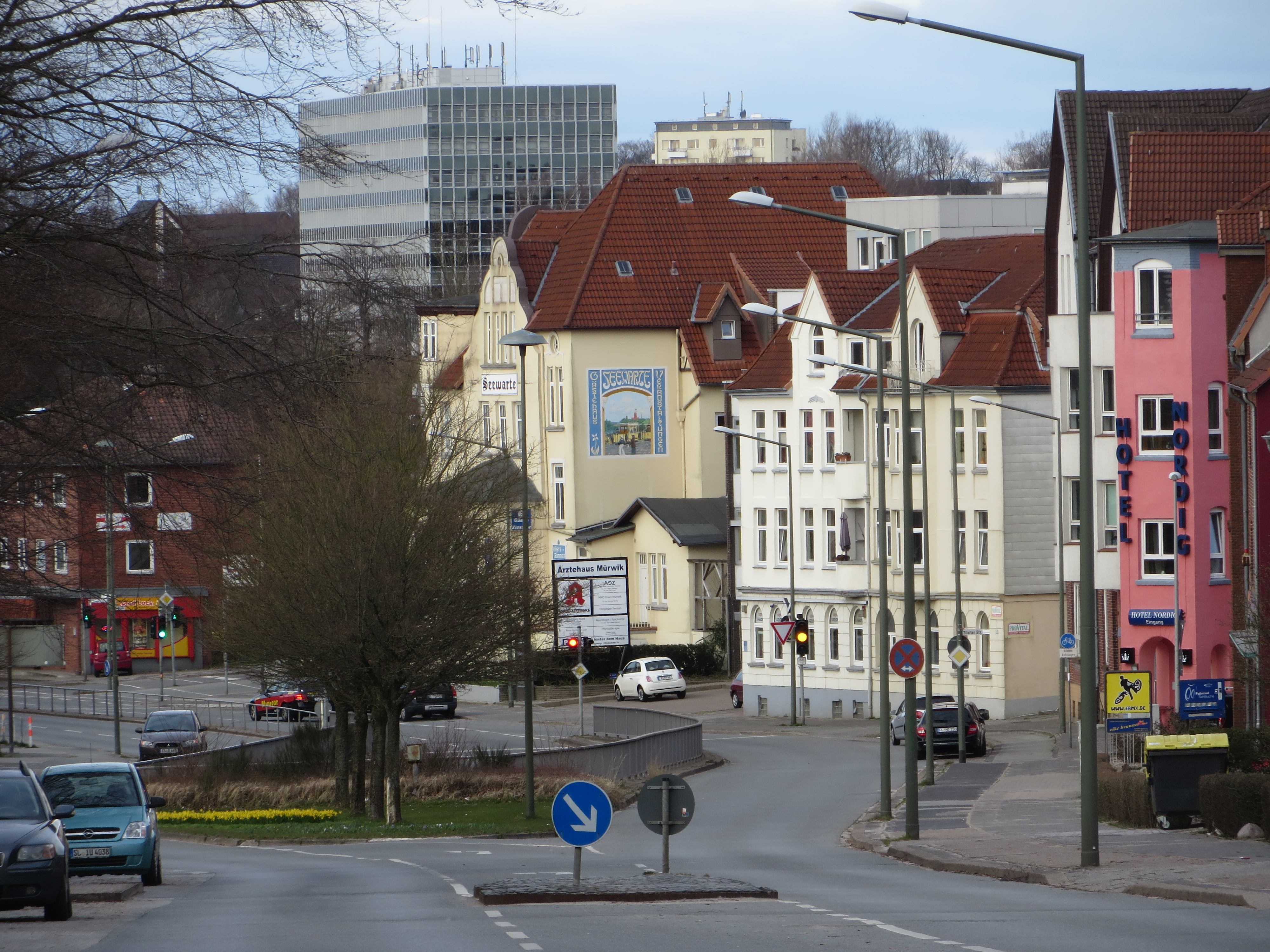 Blick Richtung zum alten Mürwiker Zentrum bei der Seewarte (Flensburg April 2015), Bild 02